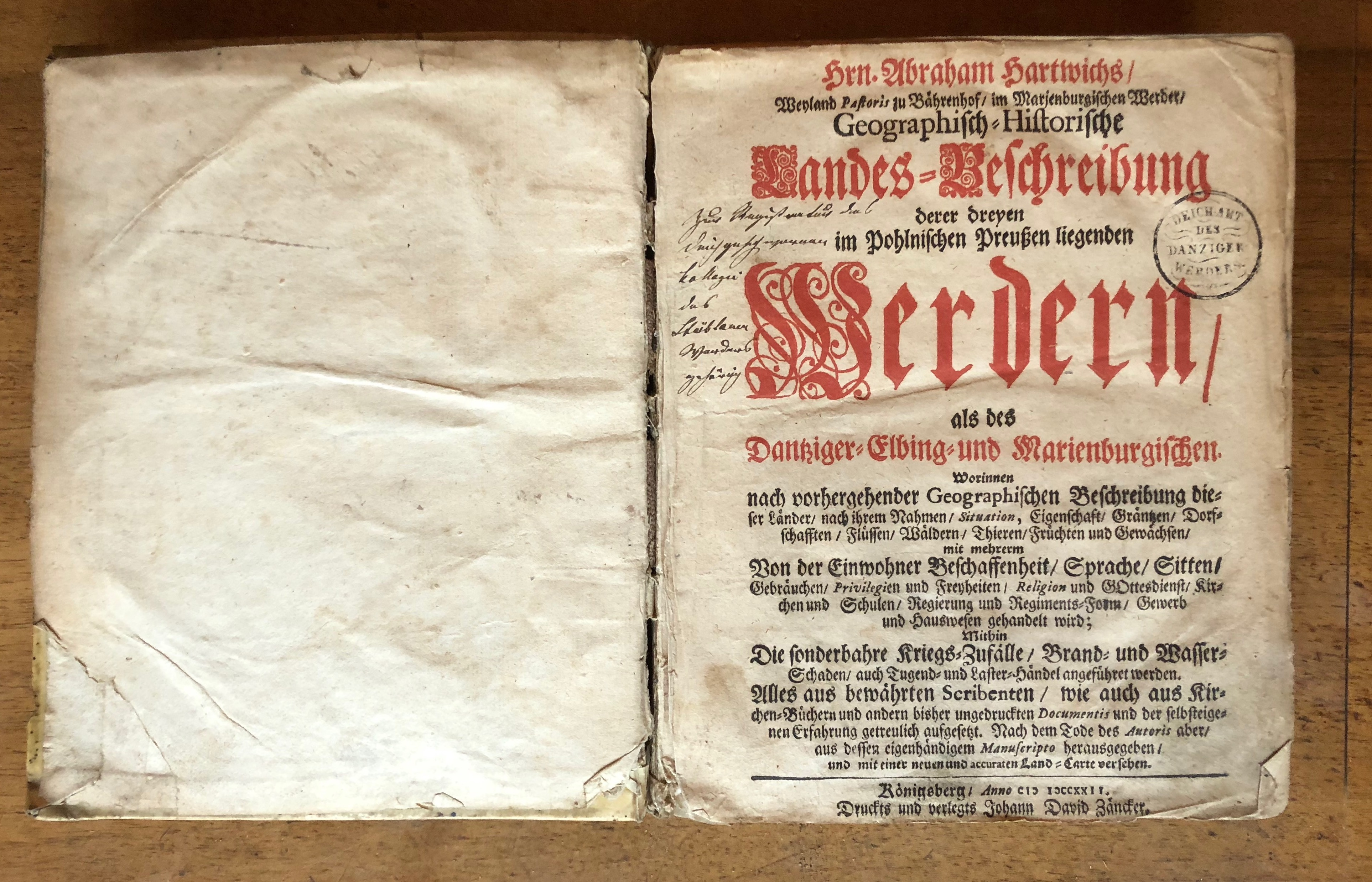 Abraham Hartwich: „Geographisch historische Landesbeschreibung deren dreyen im Polnischen Preussen liegenden Werdern als des Dantziger-Elbling und des Marienburgischen“